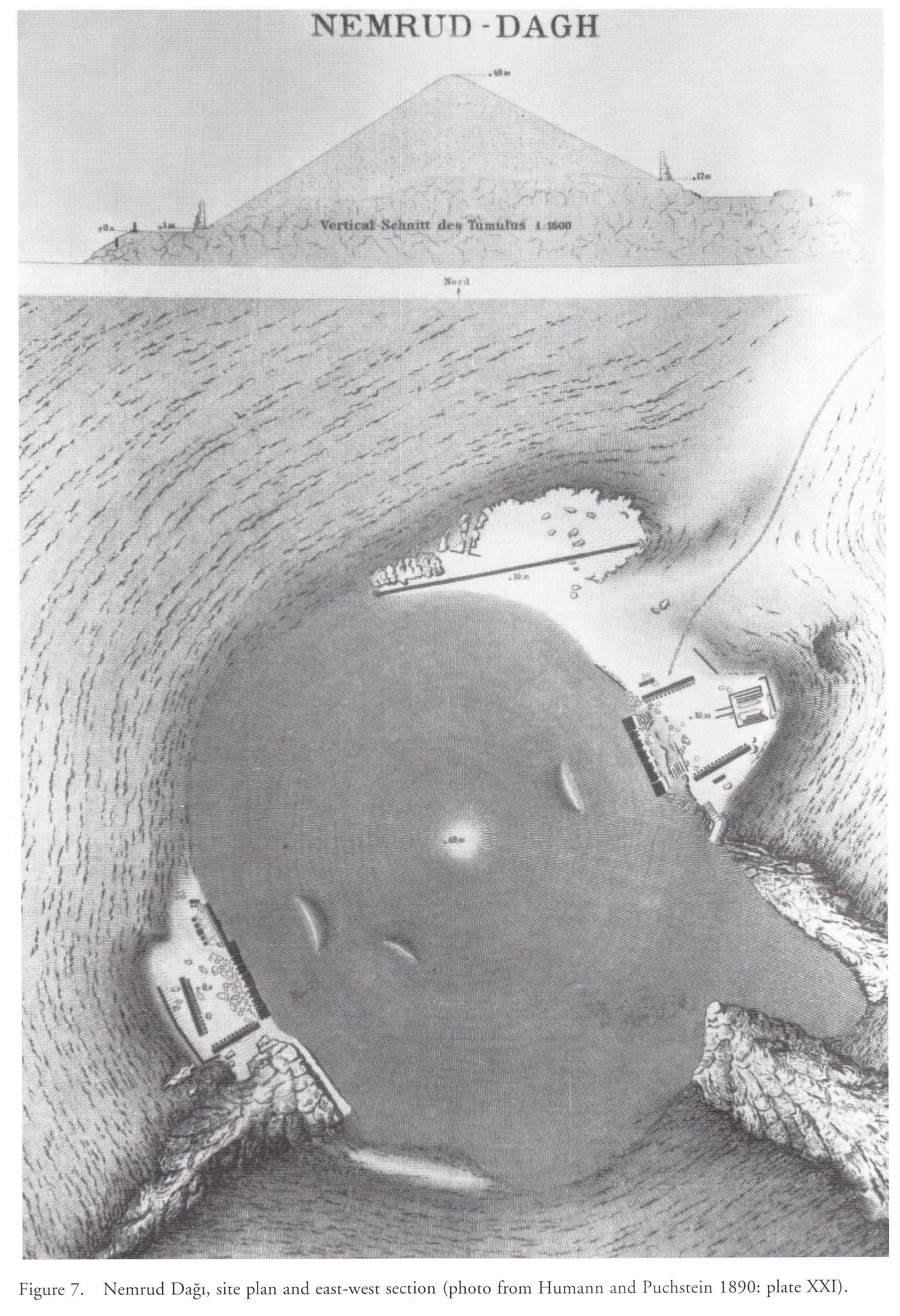 Plan des Nemrut Dağı, Türkei, aus Carl Humann, Otto Puchstein: Reisen in Kleinasien und Nordsyrien, 1890